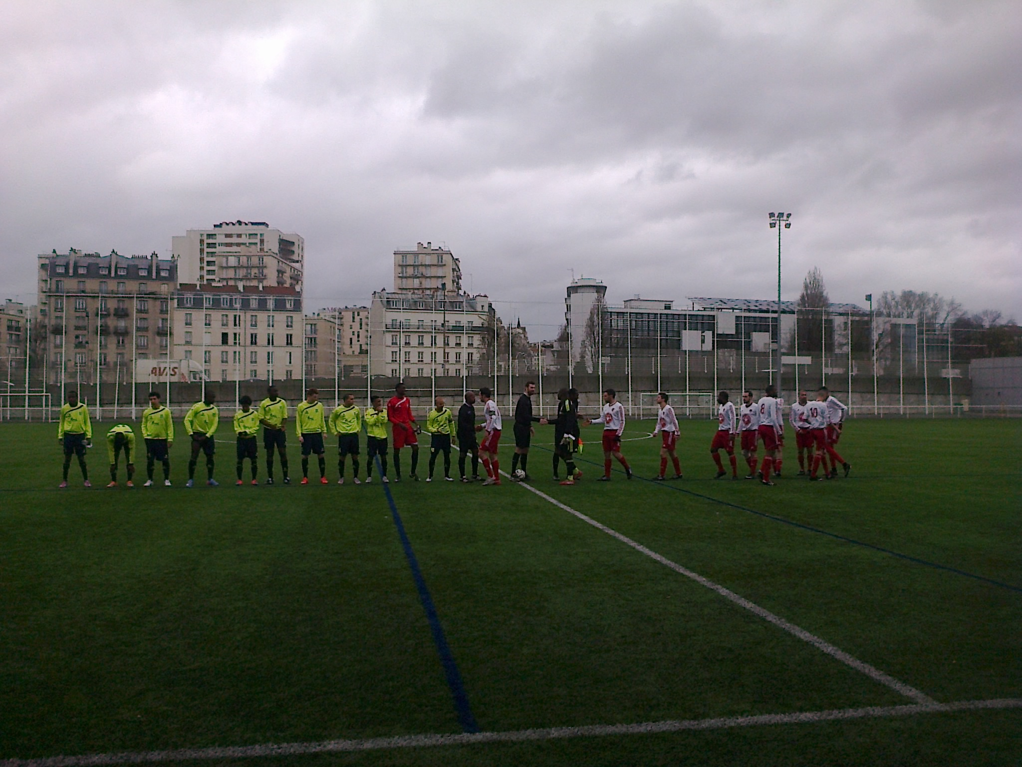 Présentation des équipes lors du match CAP Charenton - VGA Saint-Maur B en 1ère division de District Val-de-Marne le dimanche 29 mars 2015 au Stade Henri-Guérin (6-0).